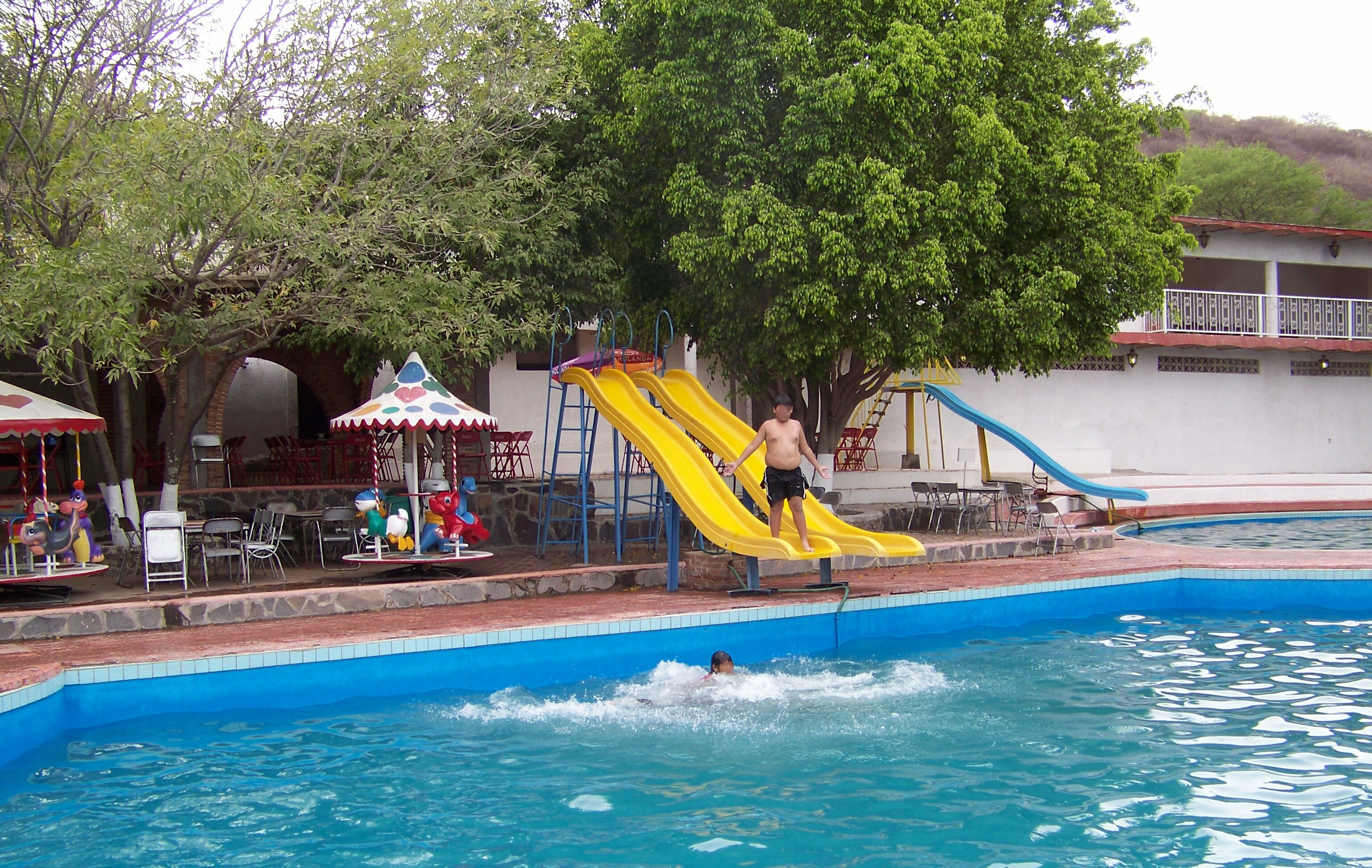 Balneario con agua termal en Atotonilco el Bajo, Jalisco México